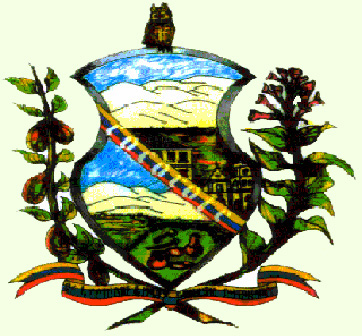 Escudo Cocorote